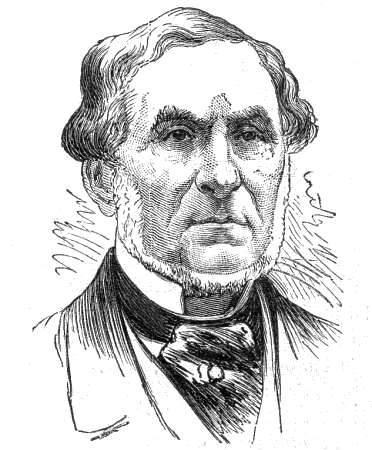 French poet Auguste Barbier (1805-1882)